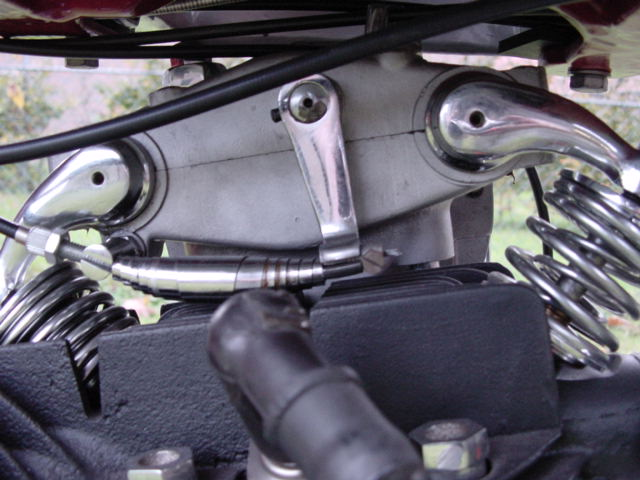 Toestemming van Yesterdays Antique Motorcycles ( Categorie: Afbeelding motorfiets